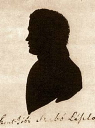 Batsányi János által a kufsteini várbörtönben fekete tussal rajzolt sziluett kép,amelyet Szentjóbi Szabó Lászlóról készített, alatta a költő aláírása. Szentjóbi Szabó László első verseskötete 1791-ben jelent meg, ebből adott jó barátjának egy példányt, amit magával vitt a várfogságba és a sziluettrajzott csirizzel ragasztotta be a verseskötet utolsó oldalára.